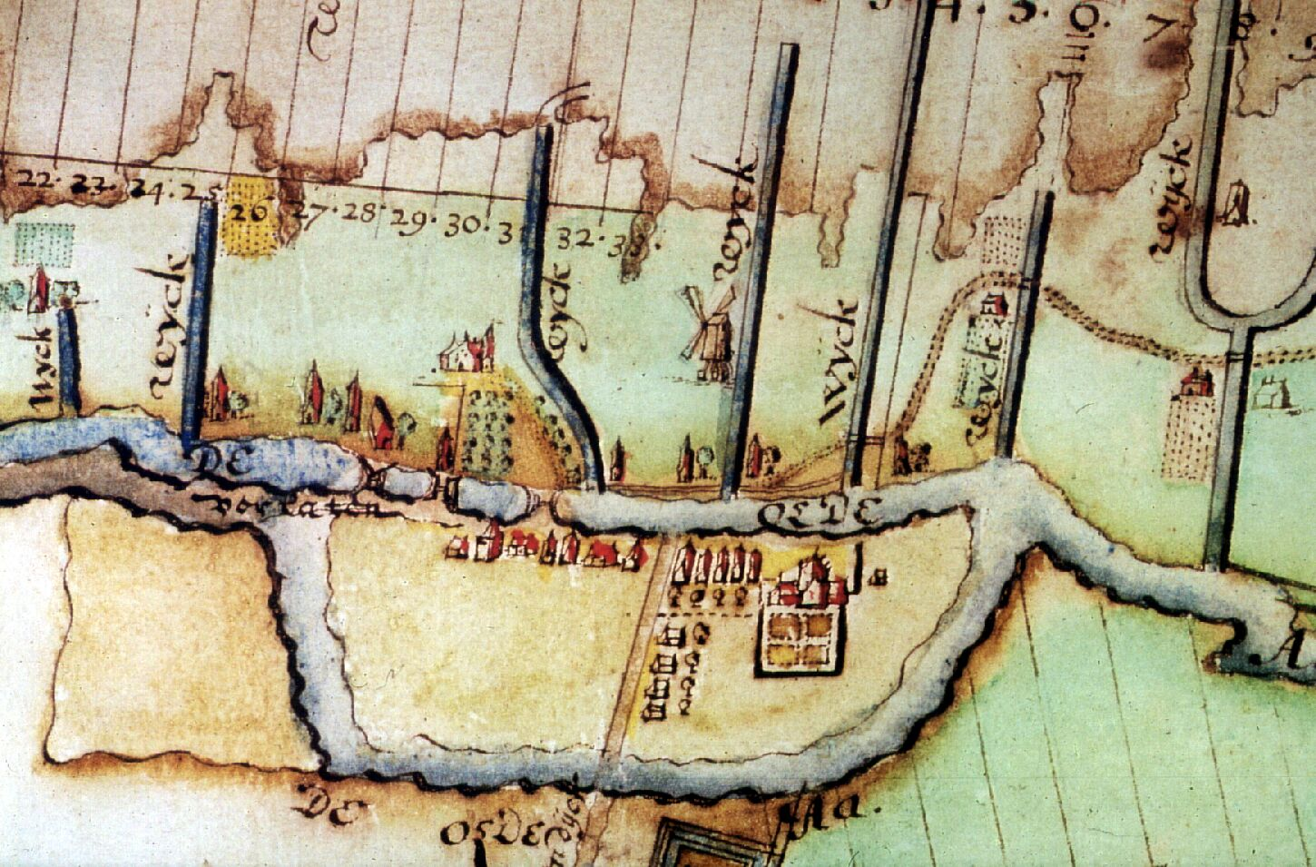 Detail van de kaart van de Pekelvenen, gemaakt door Egbert Haubois.